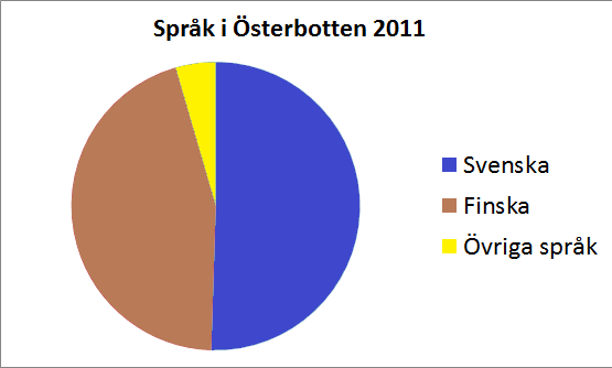 Fördelning av modersmålstalare av svenska, finska och övriga språk i landskapet Österbotten år 2011. Källa : Statistikcentralen